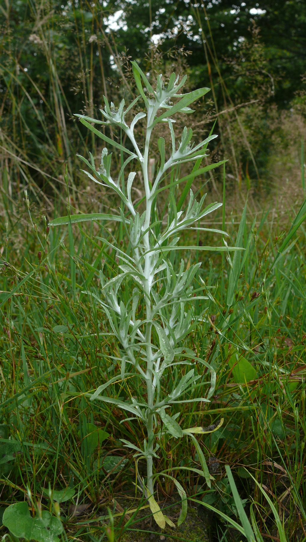 Gnaphalium uliginosum, Schwäbisch-Fränkische Waldberge, Germany